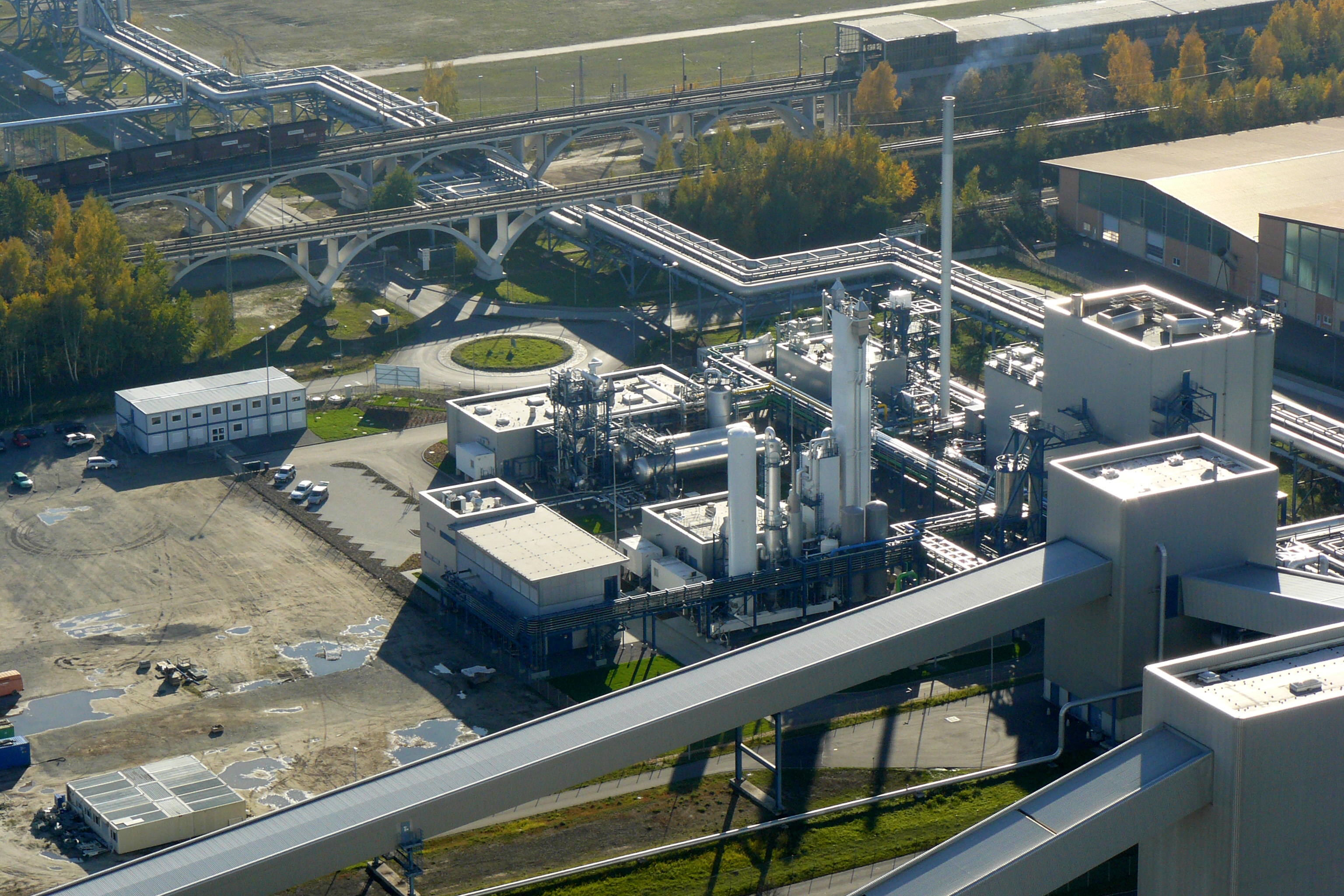 CO2-emissionsarmes Kraftwerk Schwarze Pumpe (Pilotprojekt) vom Dach des Braunkohlekraftwerkes Schwarze Pumpe aus gesehen. Spremberg/ Brandenburg/ Deutschland